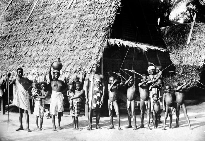 Repronegatief. Portret van een groep Marrons